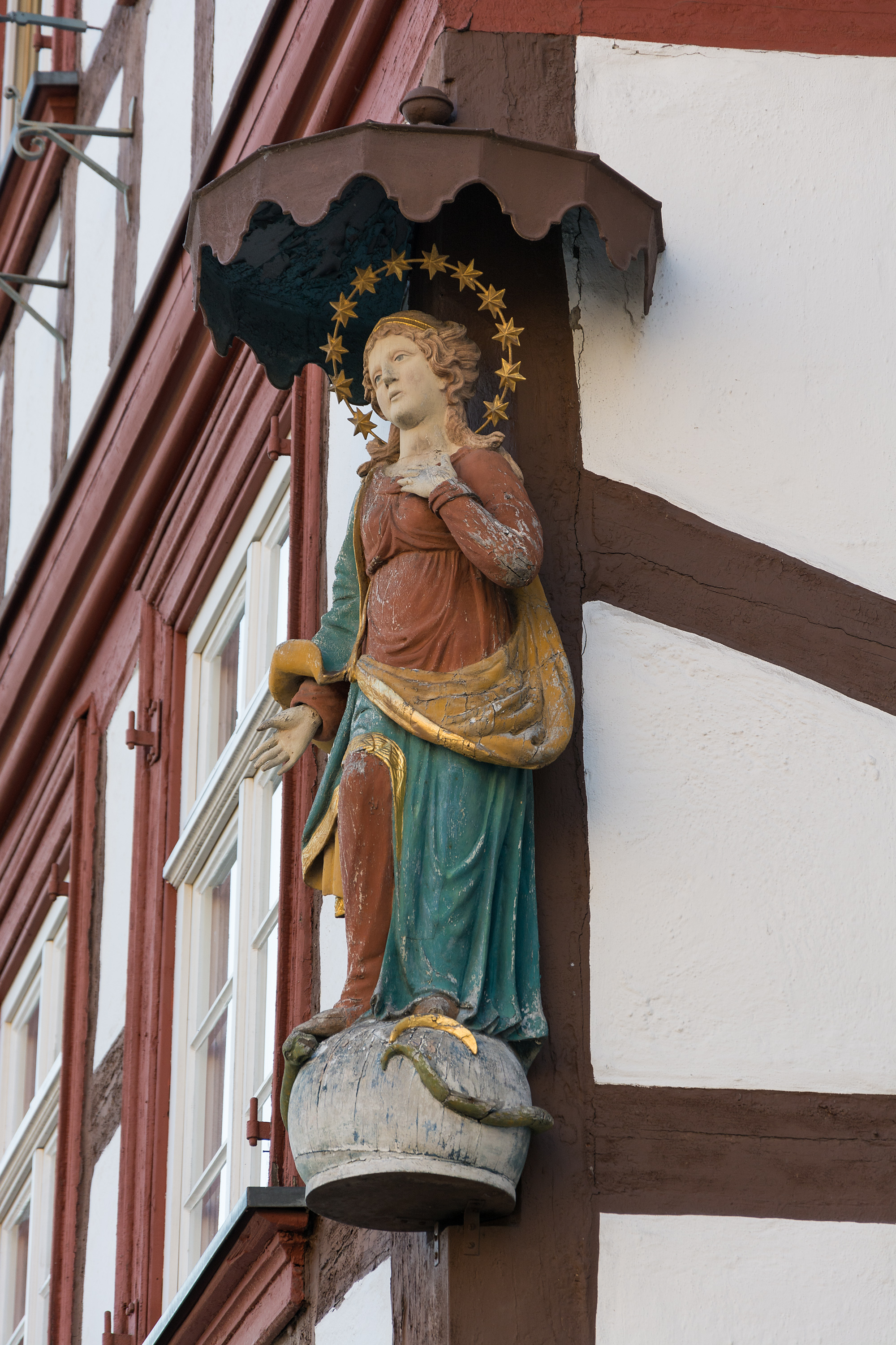 Hausfigur Maria Immaculata am ehemaligen sogenannten Papstmannschen Stipendienhaus, Lucas-Cranach-Straße 25, in Kronach.